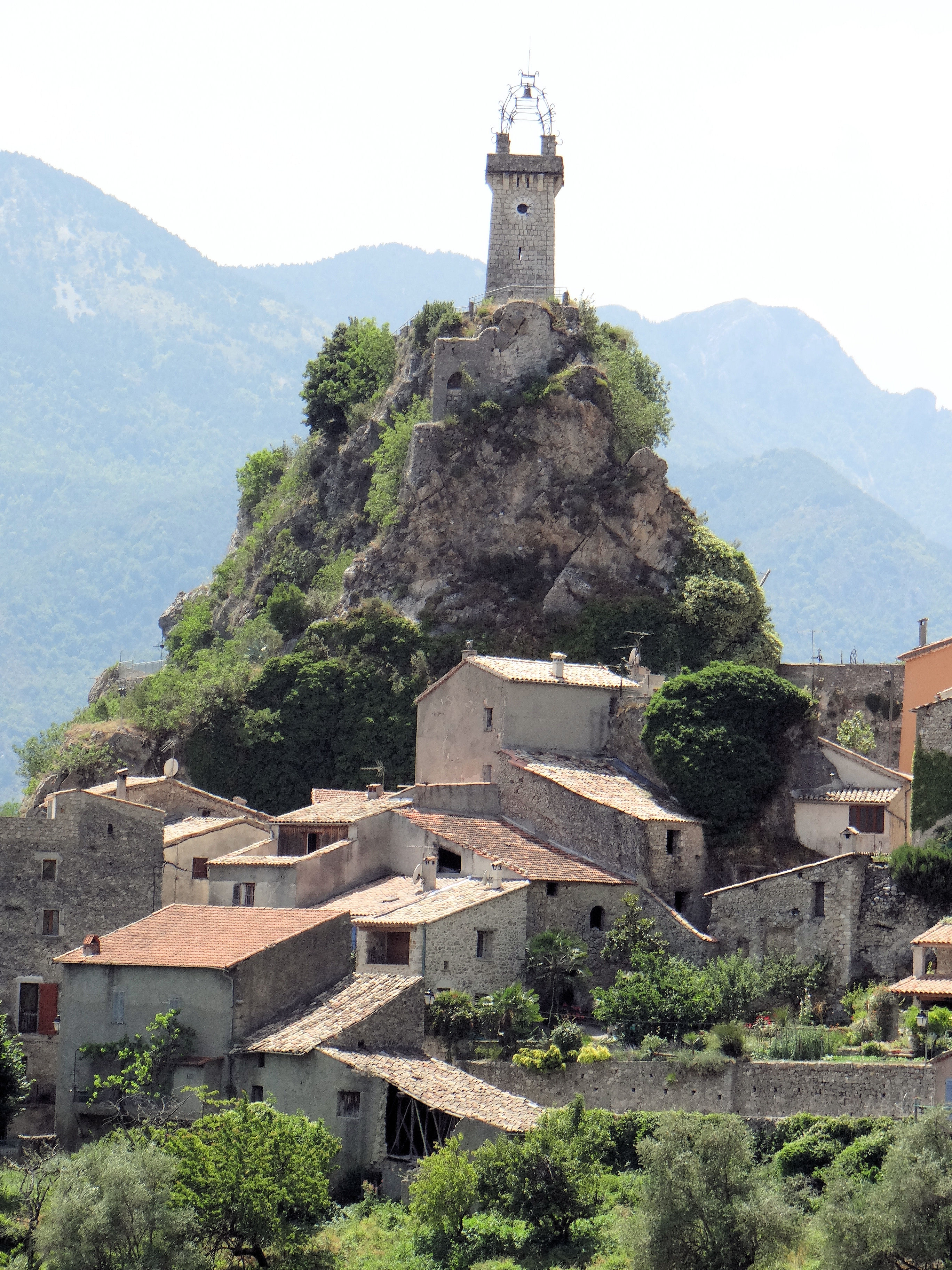 Vue de Sigale à partir de la route de Roquesteron - Détail